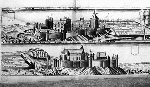 Stich mit der Ansicht des Schlosses Le Grand-Presigny, Indre-et-Loire, Frankreich